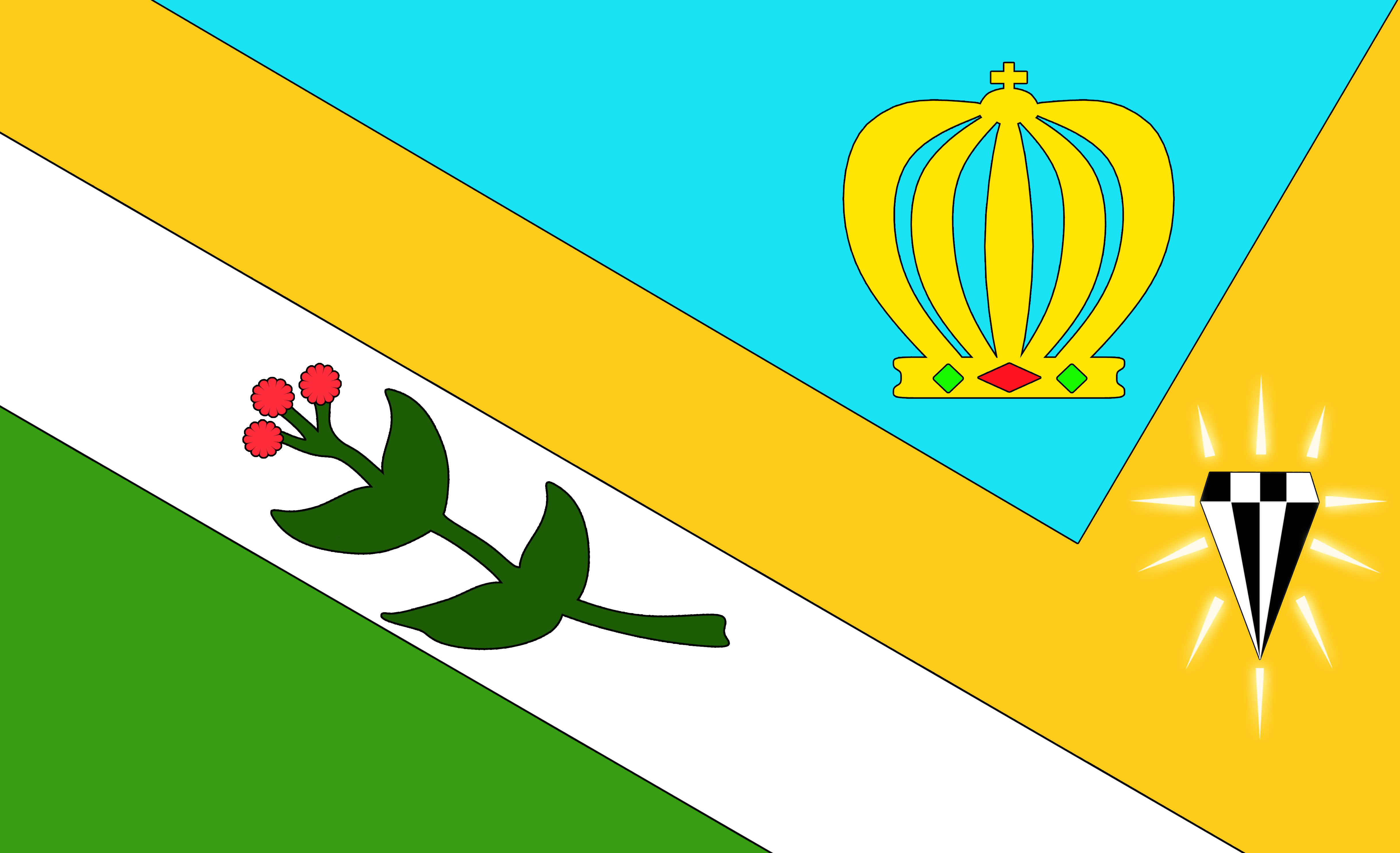 Bandeira de cidade de Brotas de Macaúbas - BA